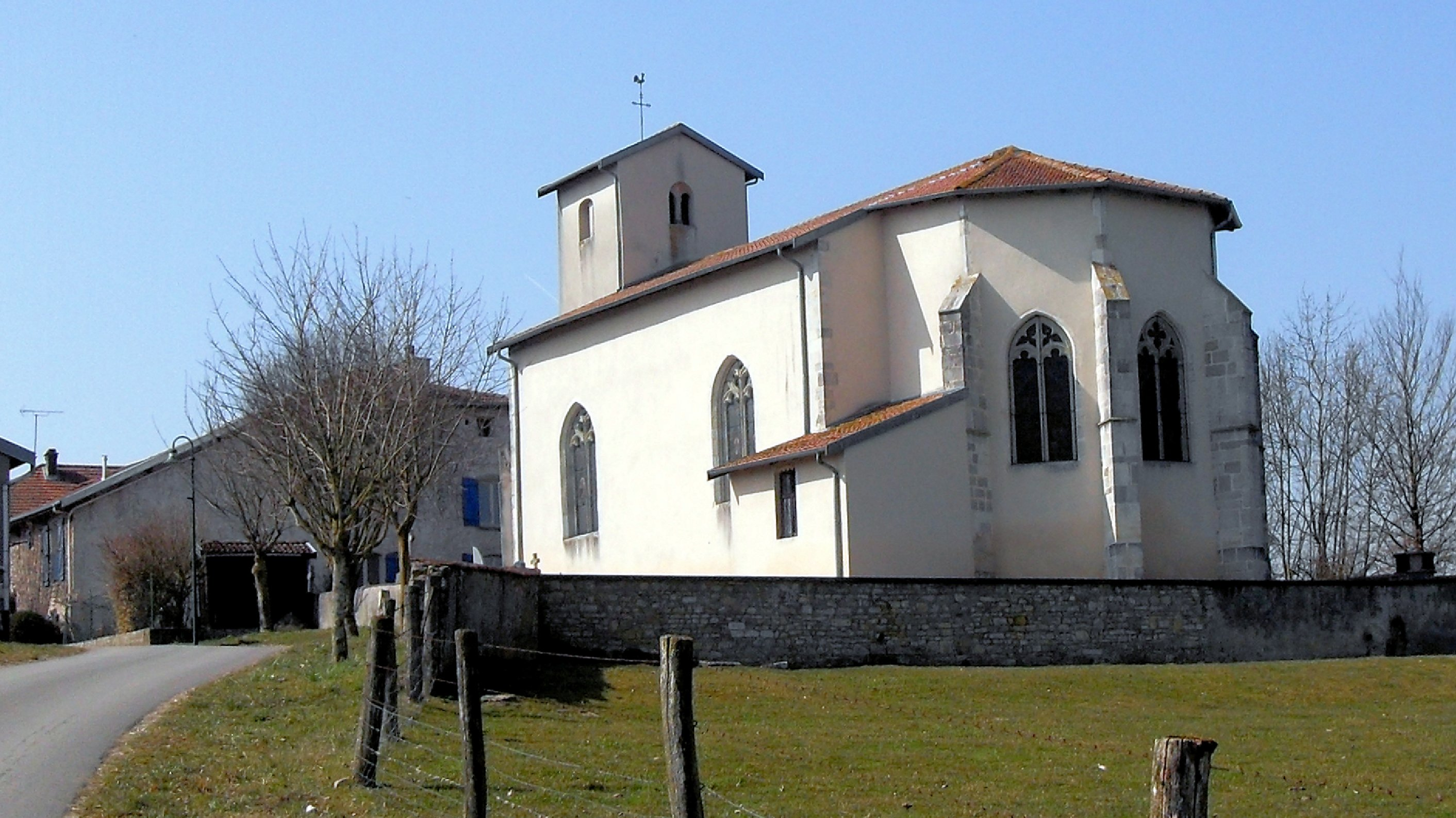 L'église Saint-Martin de Marainville-sur-Madon